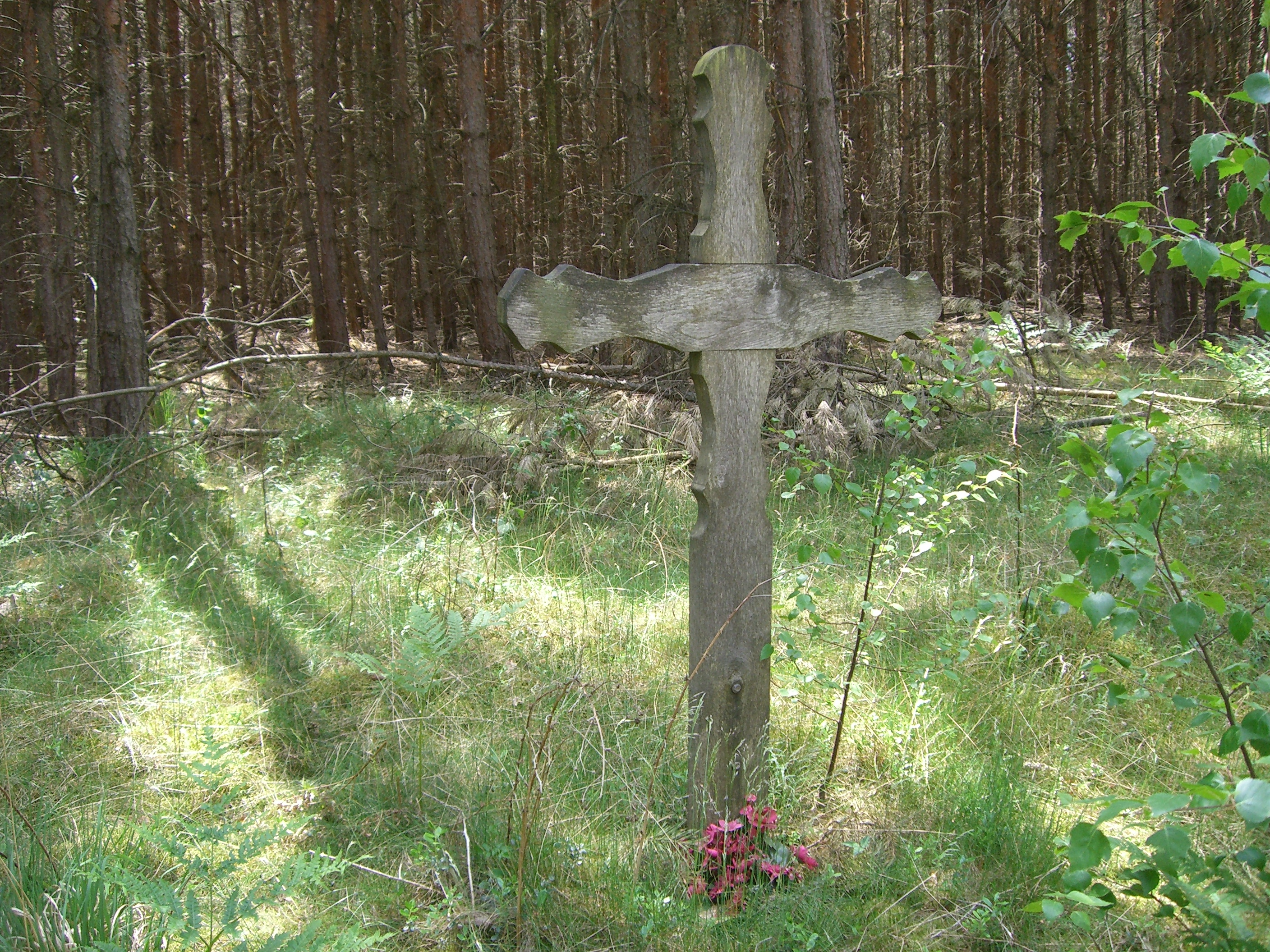 Kreuz Toter Fischer in der Annaburger Heide – an der Straße zwischen Annaburg (Sachsen-Anhalt) und Arnsnesta (Brandenburg)